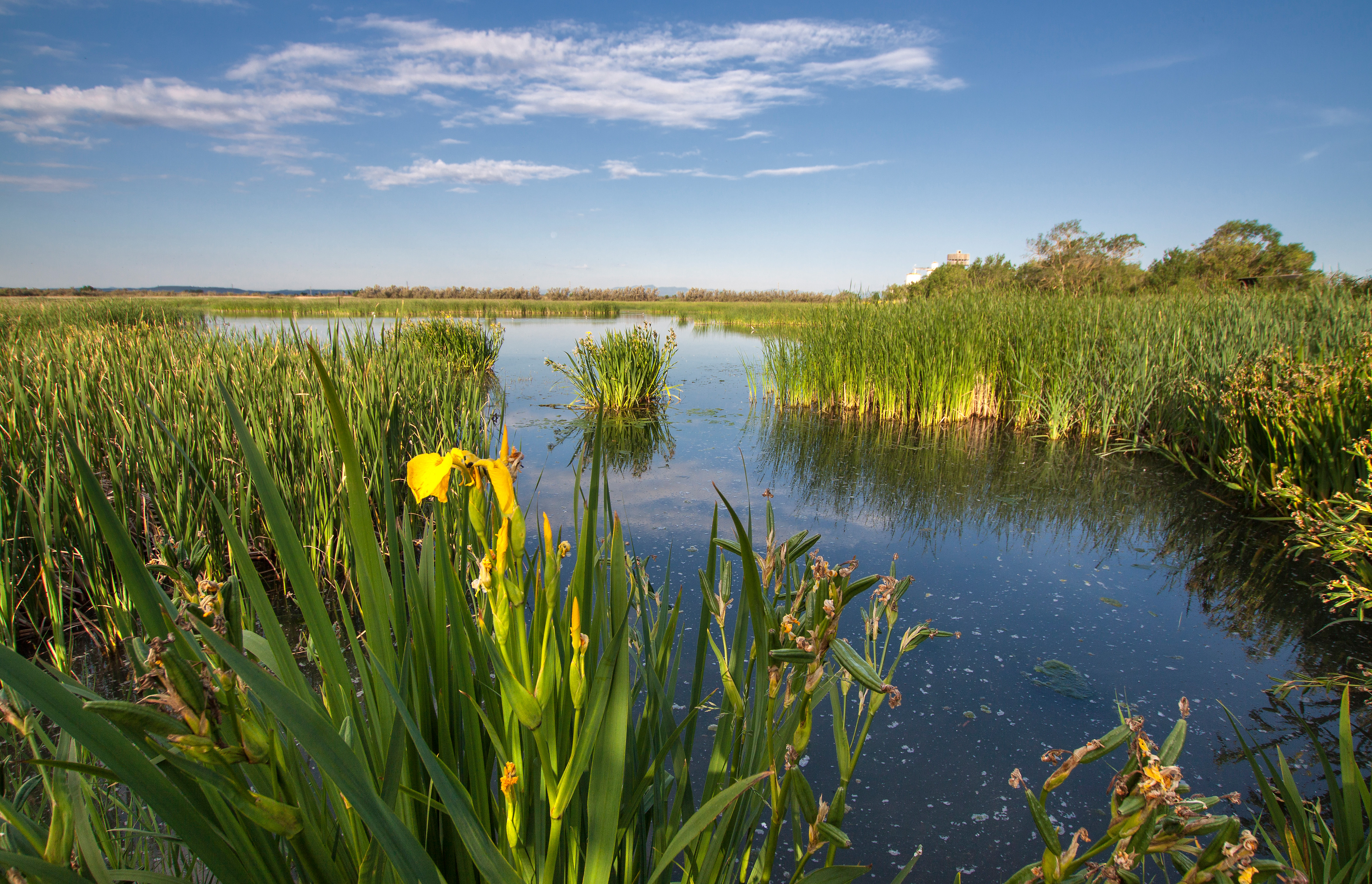 Estanys del Matà This is a a photo of a wetland in Catalonia, Spain, with id: IZHC-02000236